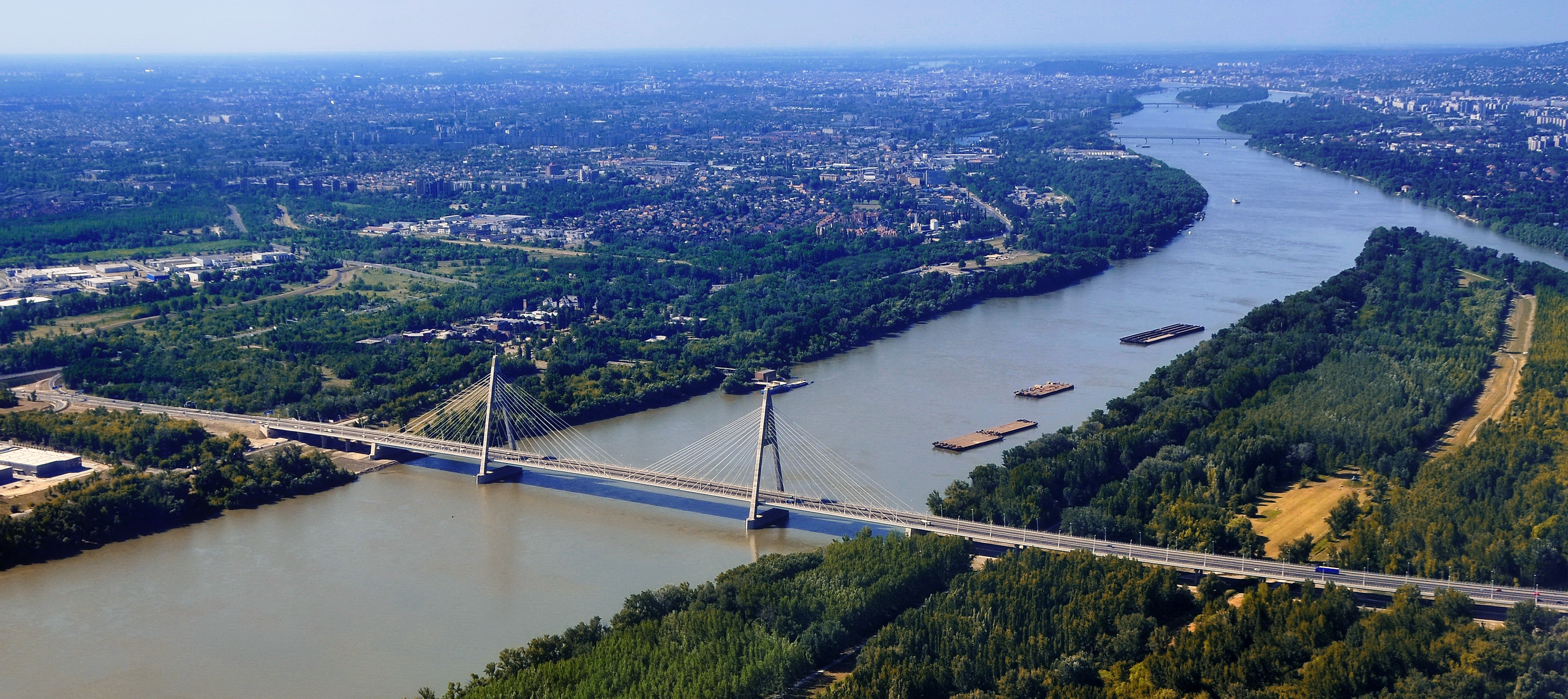 Duna folyam és a Megyeri híd a magasból